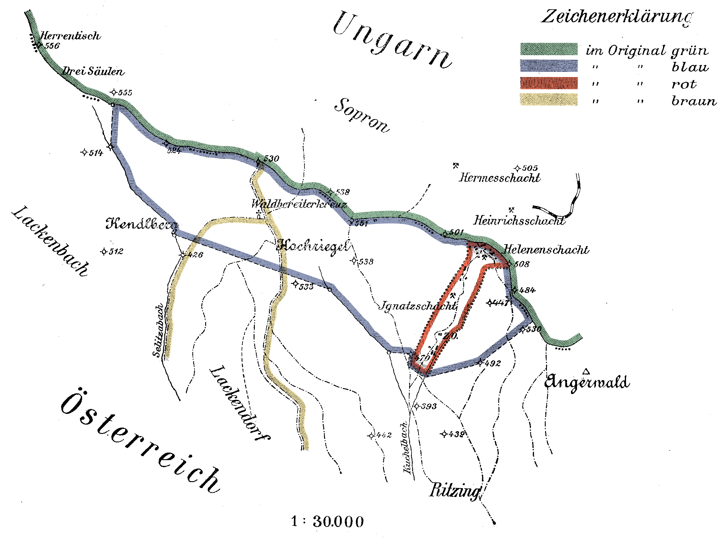 Beilageblatt zu dem zwischen der Republik Österreich und dem Königreich Ungarn am 11. März 1927 geschlossenen Übereinkommen, betreffend die Regelung der durch die Grenzziehung aufgeworfenen rechtlichen Fragen